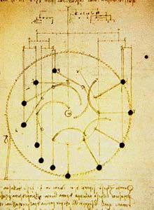 рисунок Леонардо да Винчи - Вечный двигатель